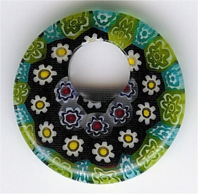 Millefiori glass pendant.